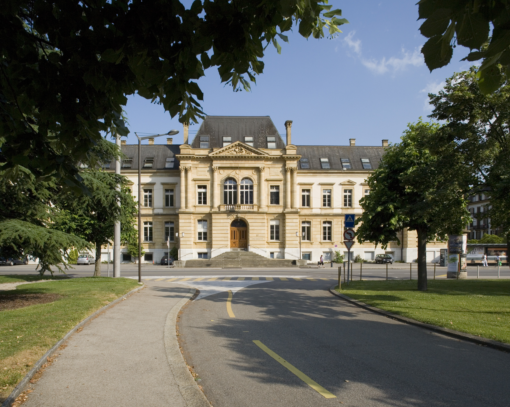 Description Bâtiment principal de l'Université de Neuchâtel Datefin juin 2006SourceOwn work by the original uploaderAuthorYves André Bâtiment principal de l'Université de Neuchâtel